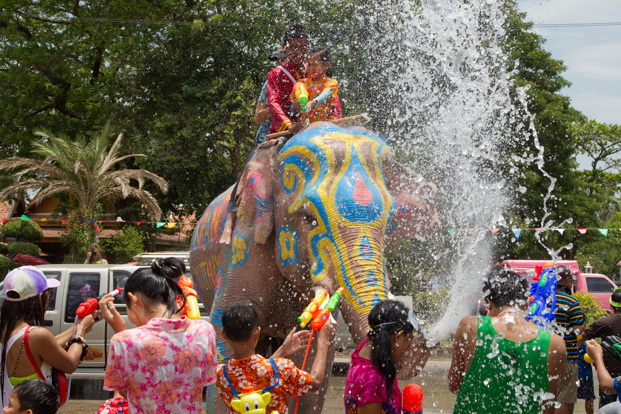 Songkran in Ayutthaya, Ayuttaya Province, Thailand